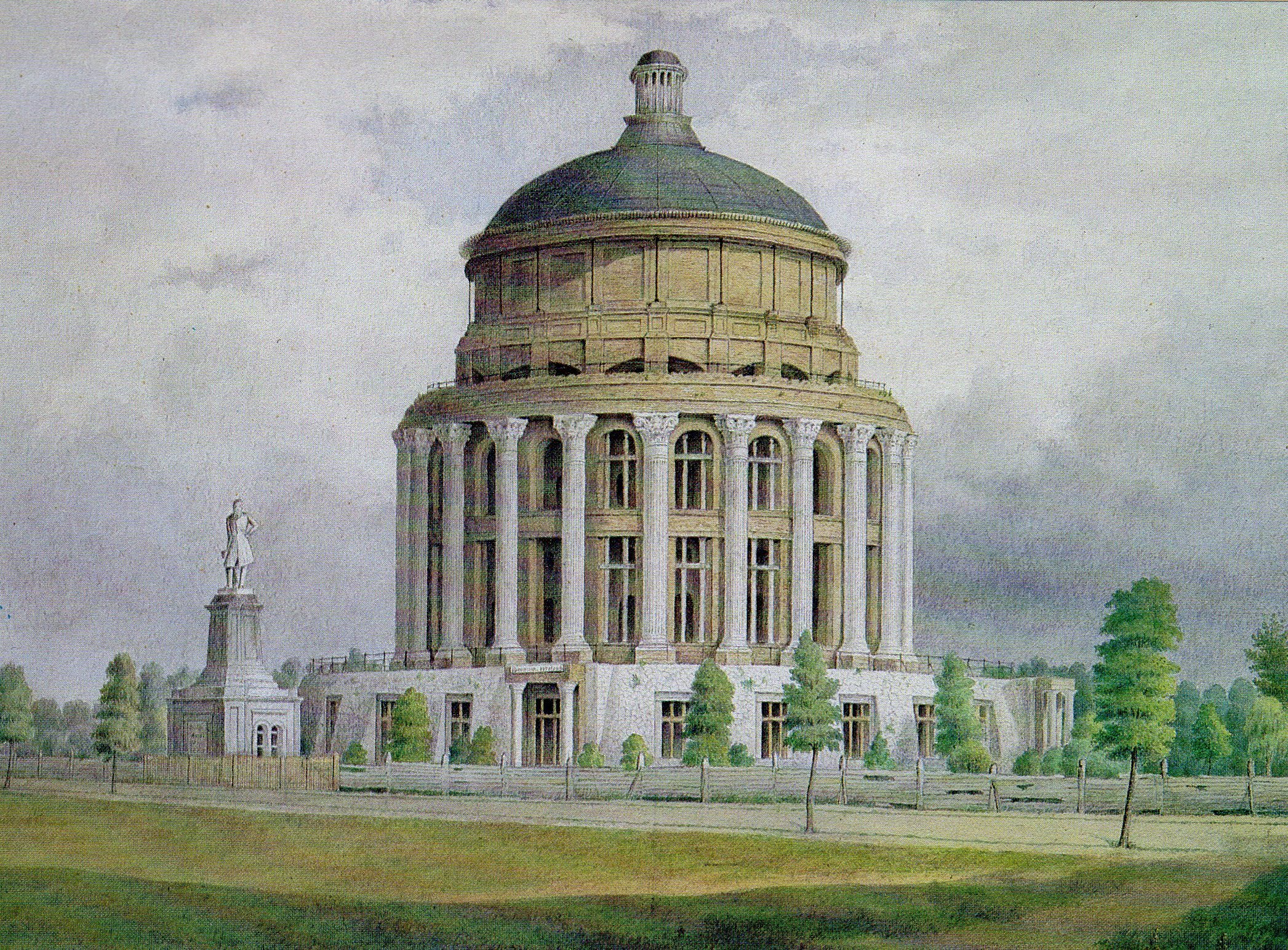 Der Germaniaturm in Westend, Aquarell